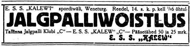 Kuulutus